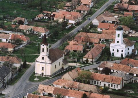 Noszlop Hungary aerialphotography. Fájdalmas Szűz római katolikus templom